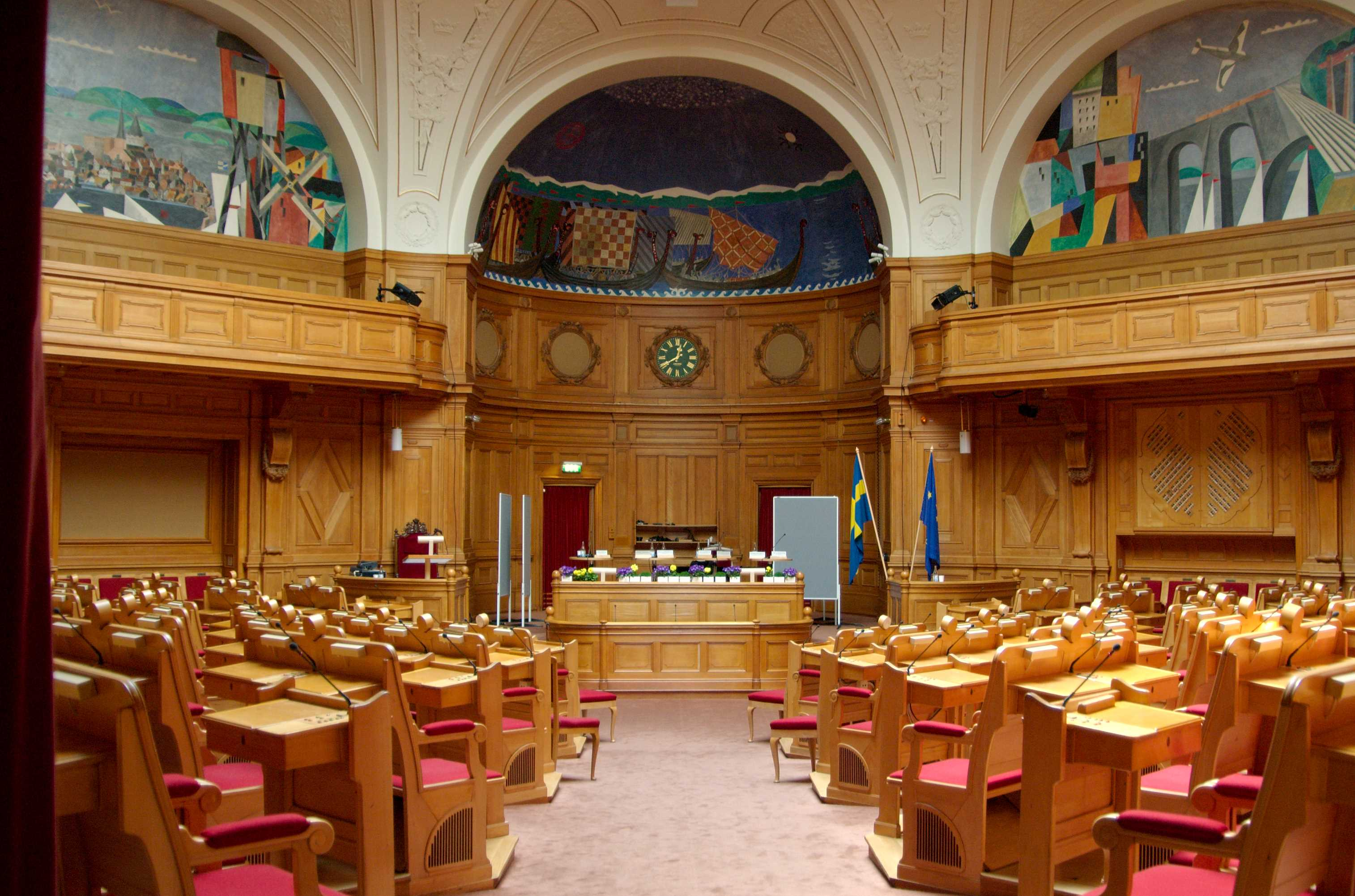 Första-kammar-salen